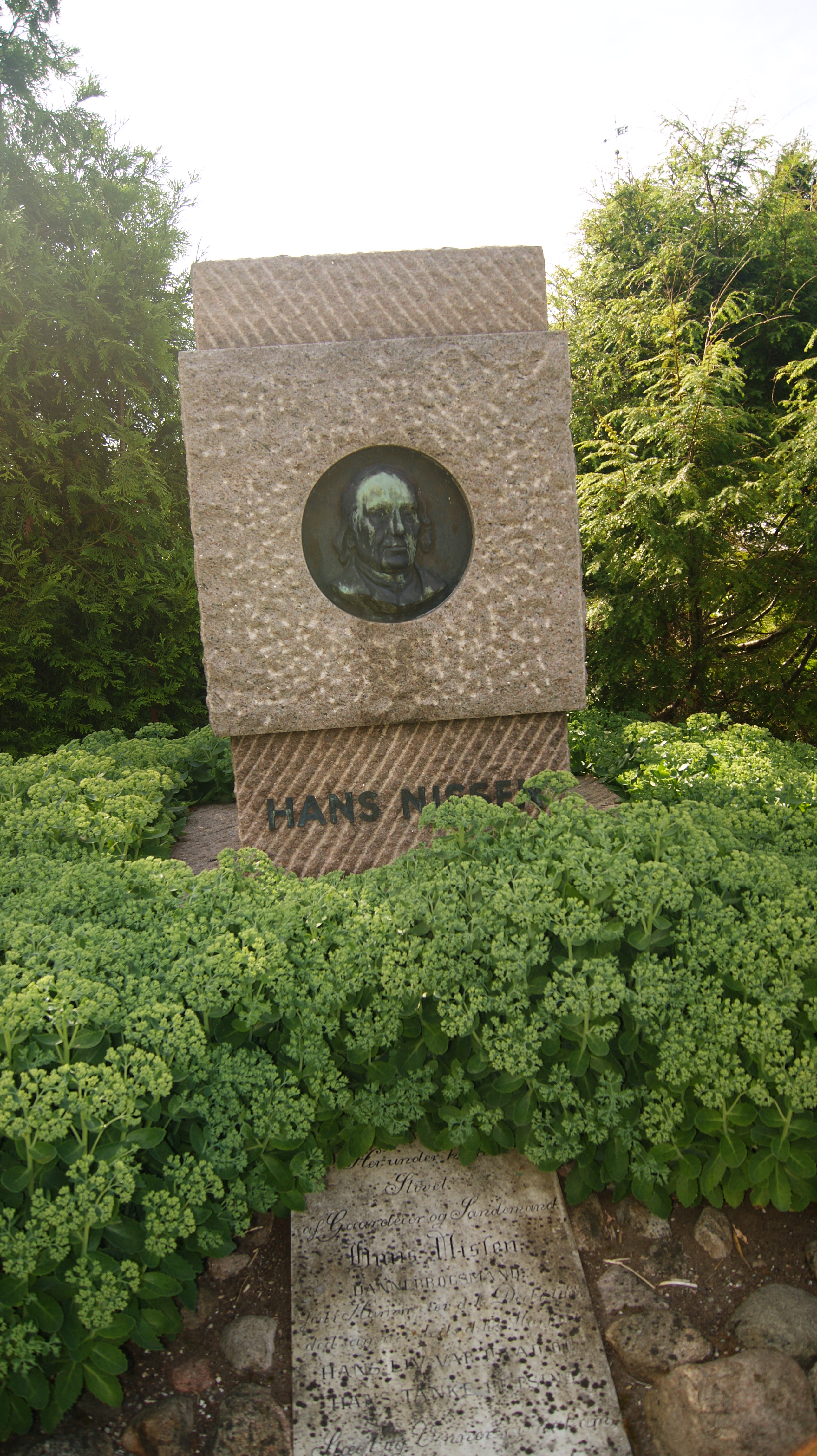 Hans Nissen - grav på Hammelev kirkegård.